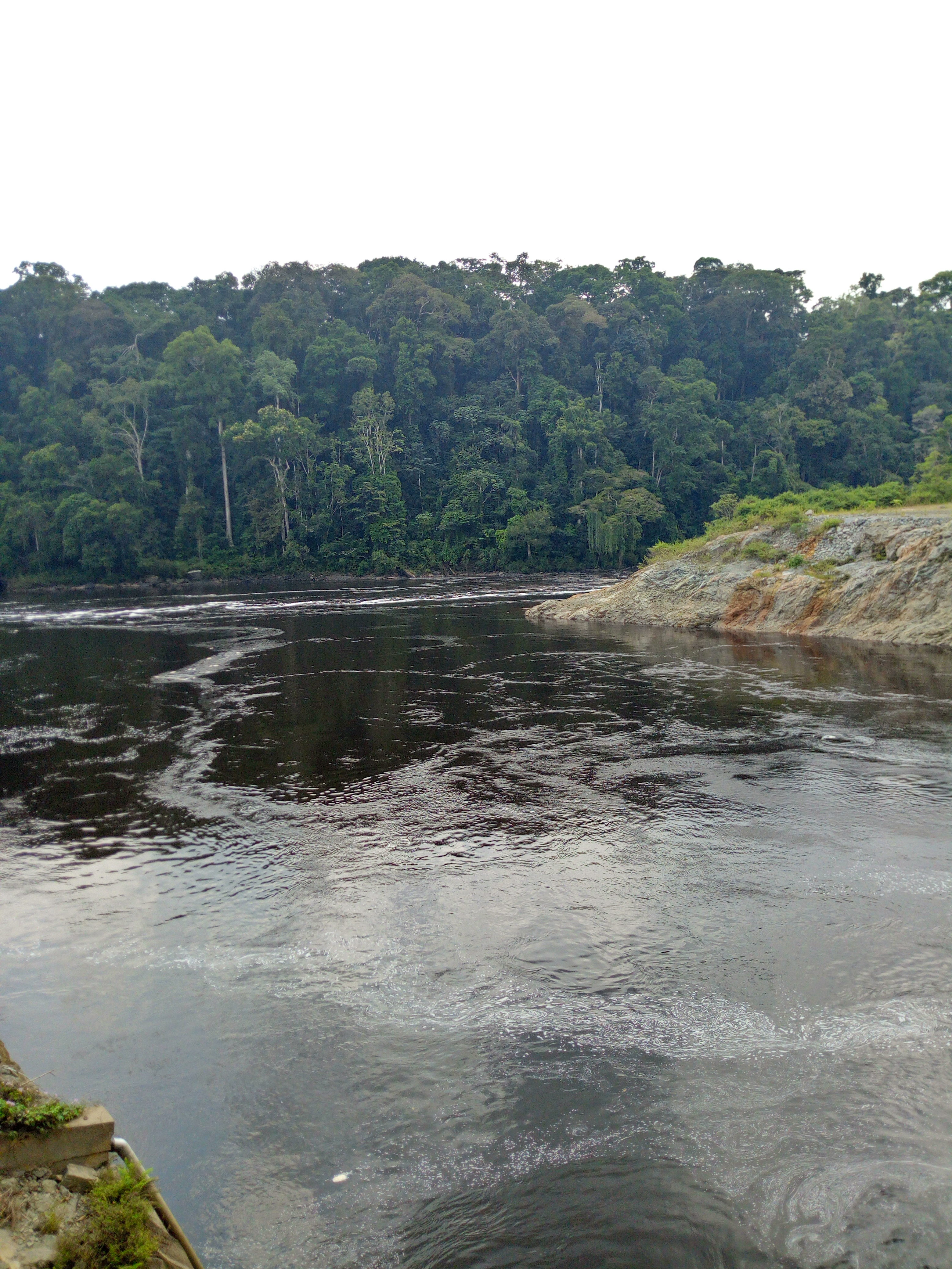 photo d'une partie du fleuve Ntem dans la région du sud Cameroun à la frontière de la Guinée équatoriale dans la localité de Memve'ele.